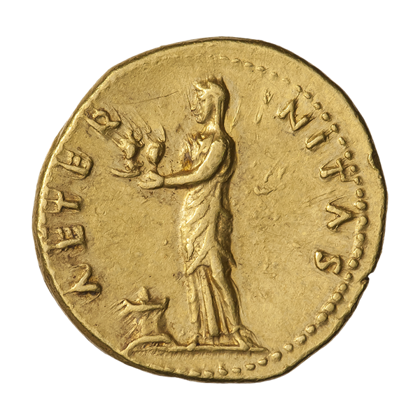 Ауреус. Веспасиан. Ок. 75—79 гг. (реверс). Надпись AETERNITAS. Этернита (персонификация вечности) стоит, влево; в руках бюсты Солнца и Луны; внизу алтарь с пылающим огнём.